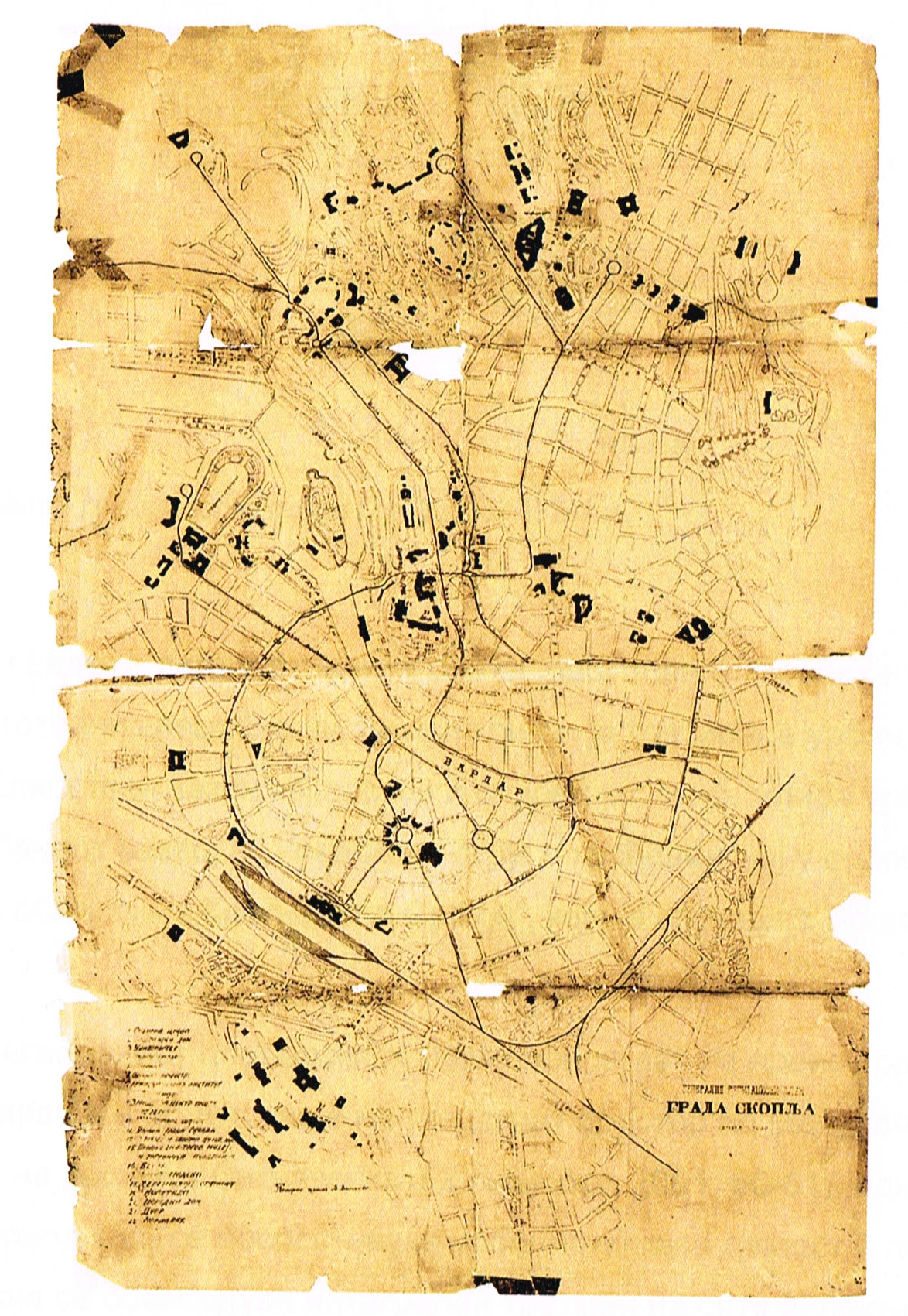 План на градот